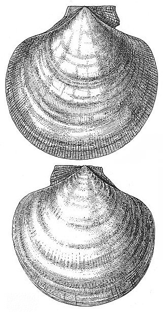 Palliolum gerardi from British Pliocene Crag deposits